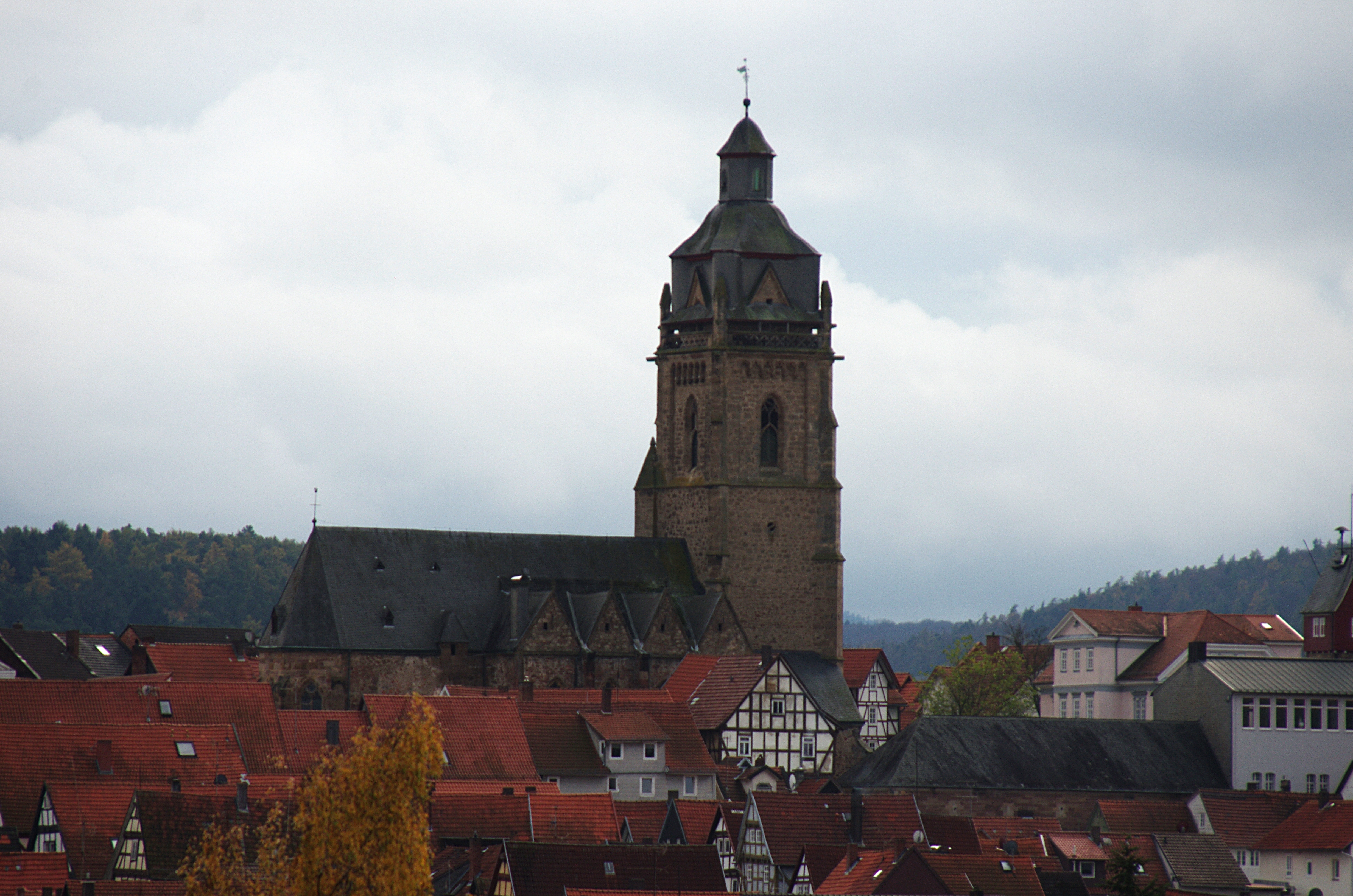 Bad Wildungen in Hessen. Die Stadtpfarrkirche in der Altstadt steht unter Denkmalschutz.